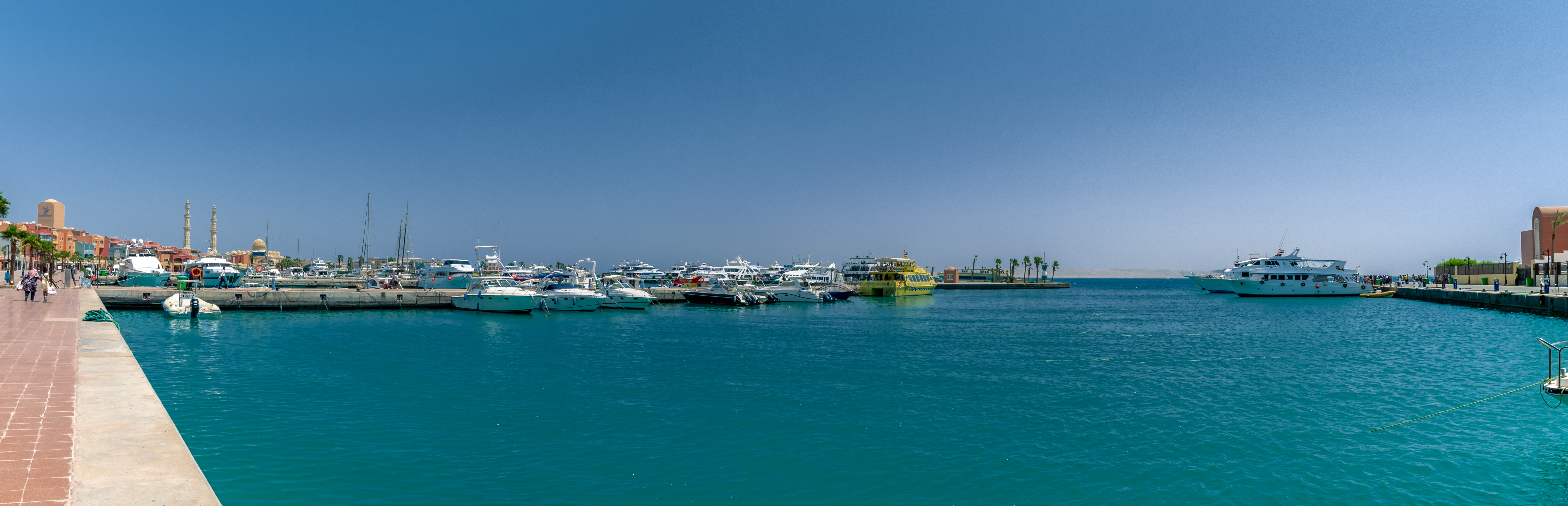 Die Marina (Jachthafen) in Hurghada